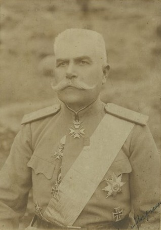 Началника на Трета пехотна балканска дивизия генерал Никола Рибаров.